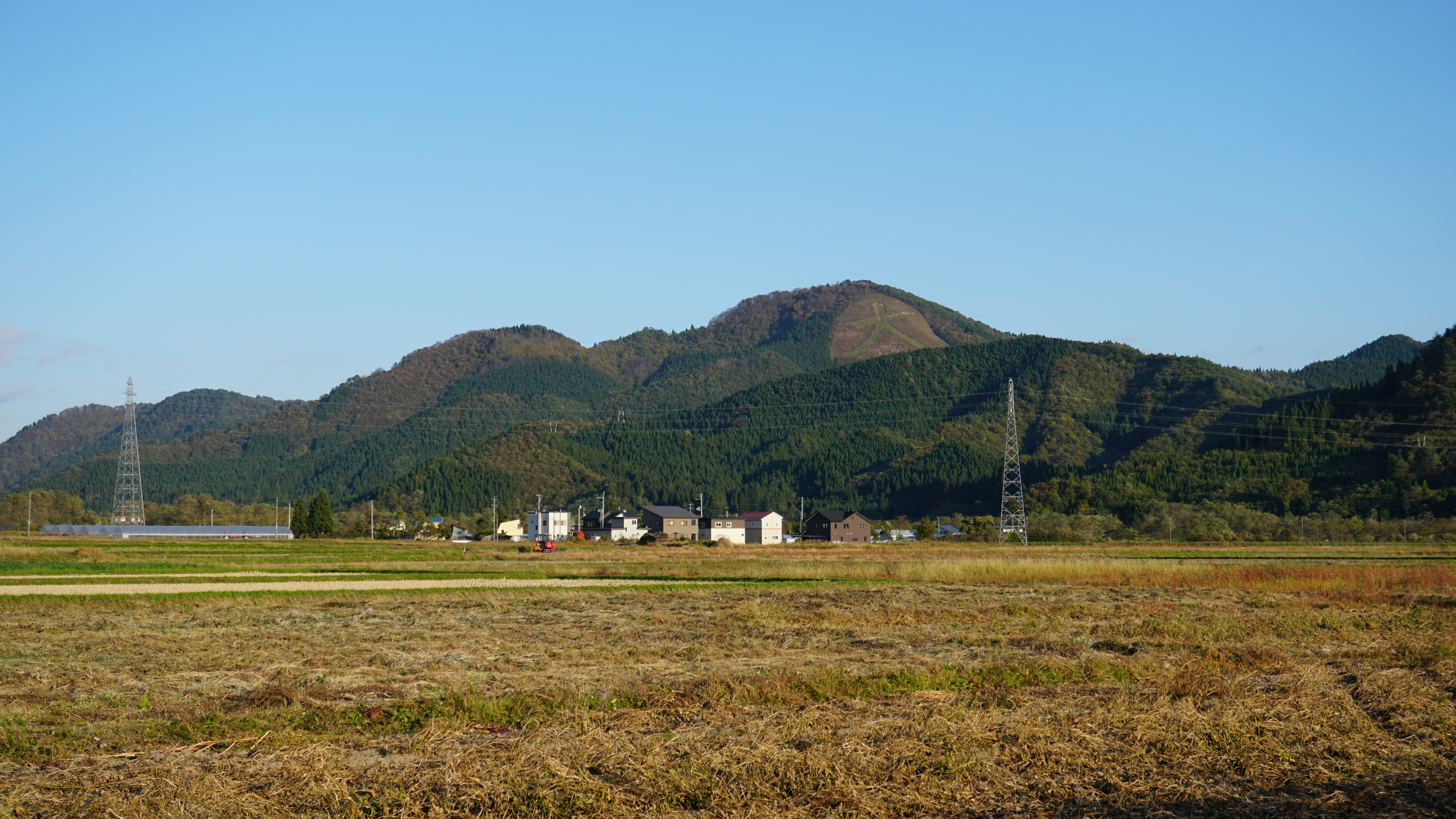 鳳凰山（秋田県大館市）